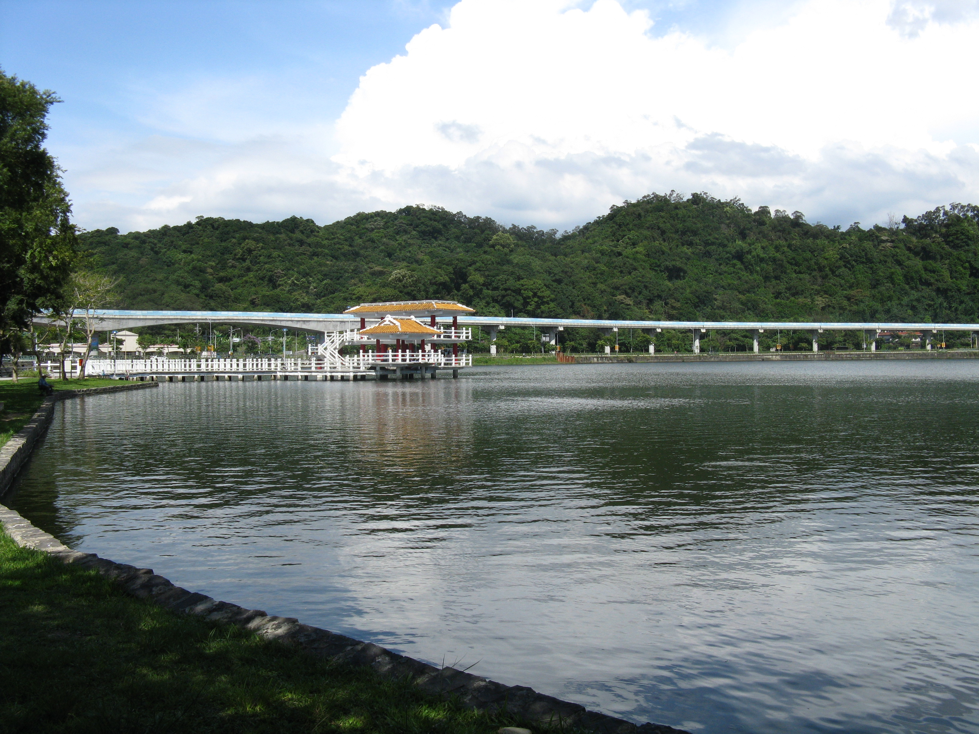 台北捷運内湖線遠景と大湖公園九曲橋（大湖公園駅 - 葫洲駅間）。